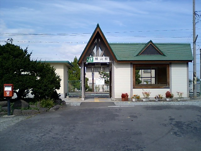 Tateyama Station, Yamagata, Yamagata, Japan